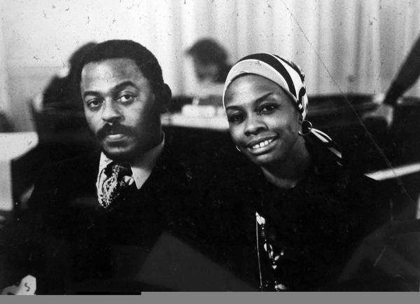 Shirley Bunnie Foy e Archie Shepp negli anni settanta